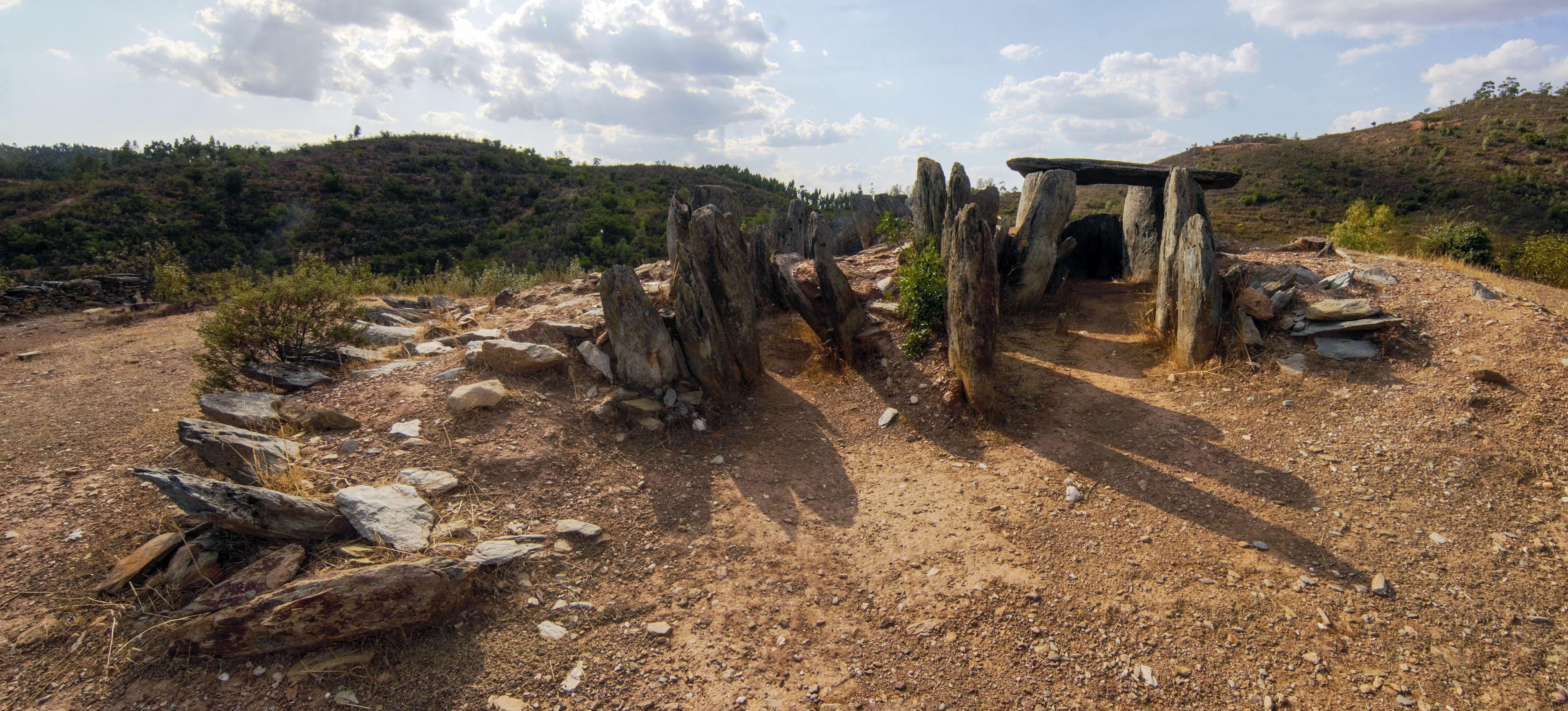 El Pozuelo, Zalame la Real, Huelva.